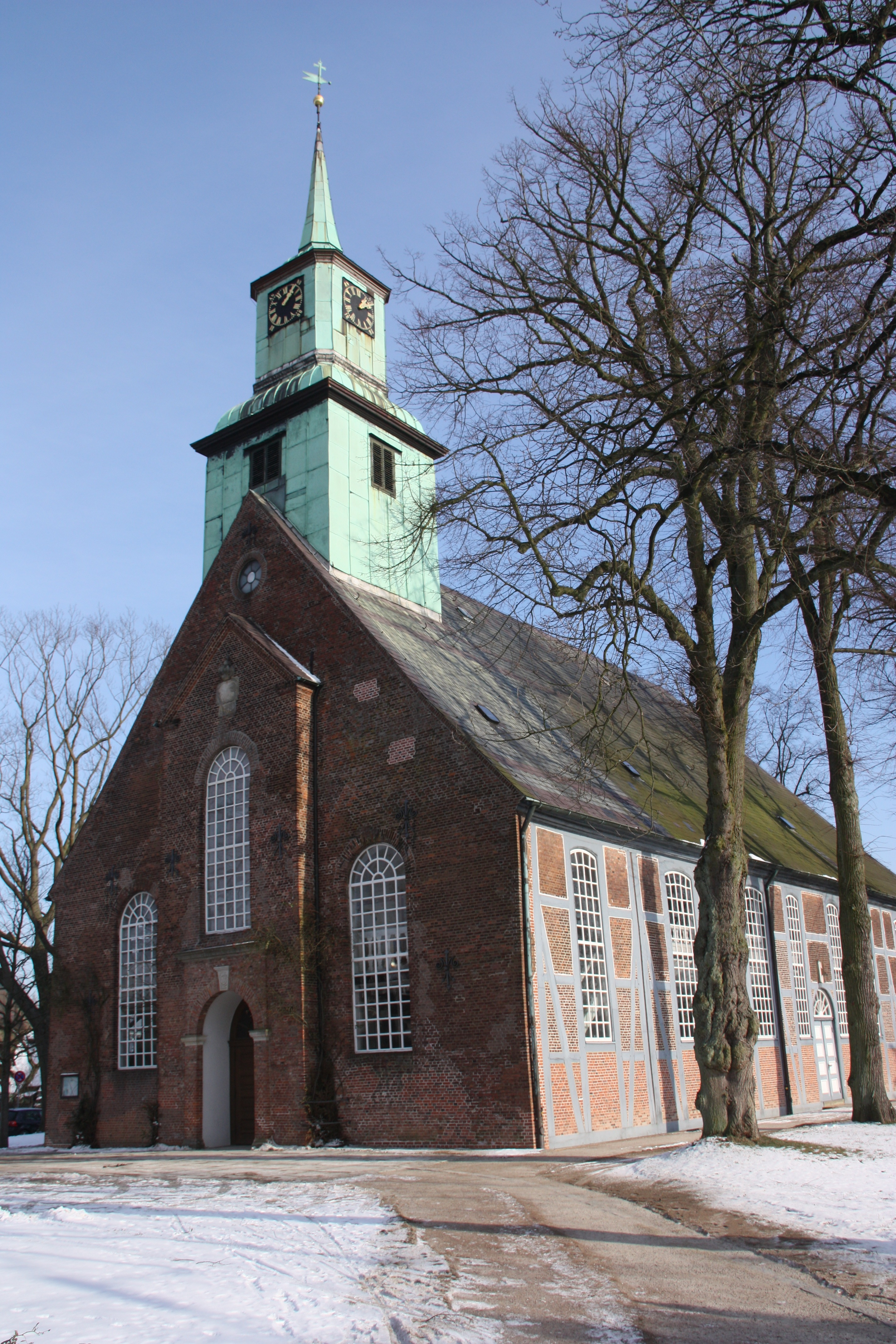 Hamburg, Nienstedtener Kirche von Südwesten